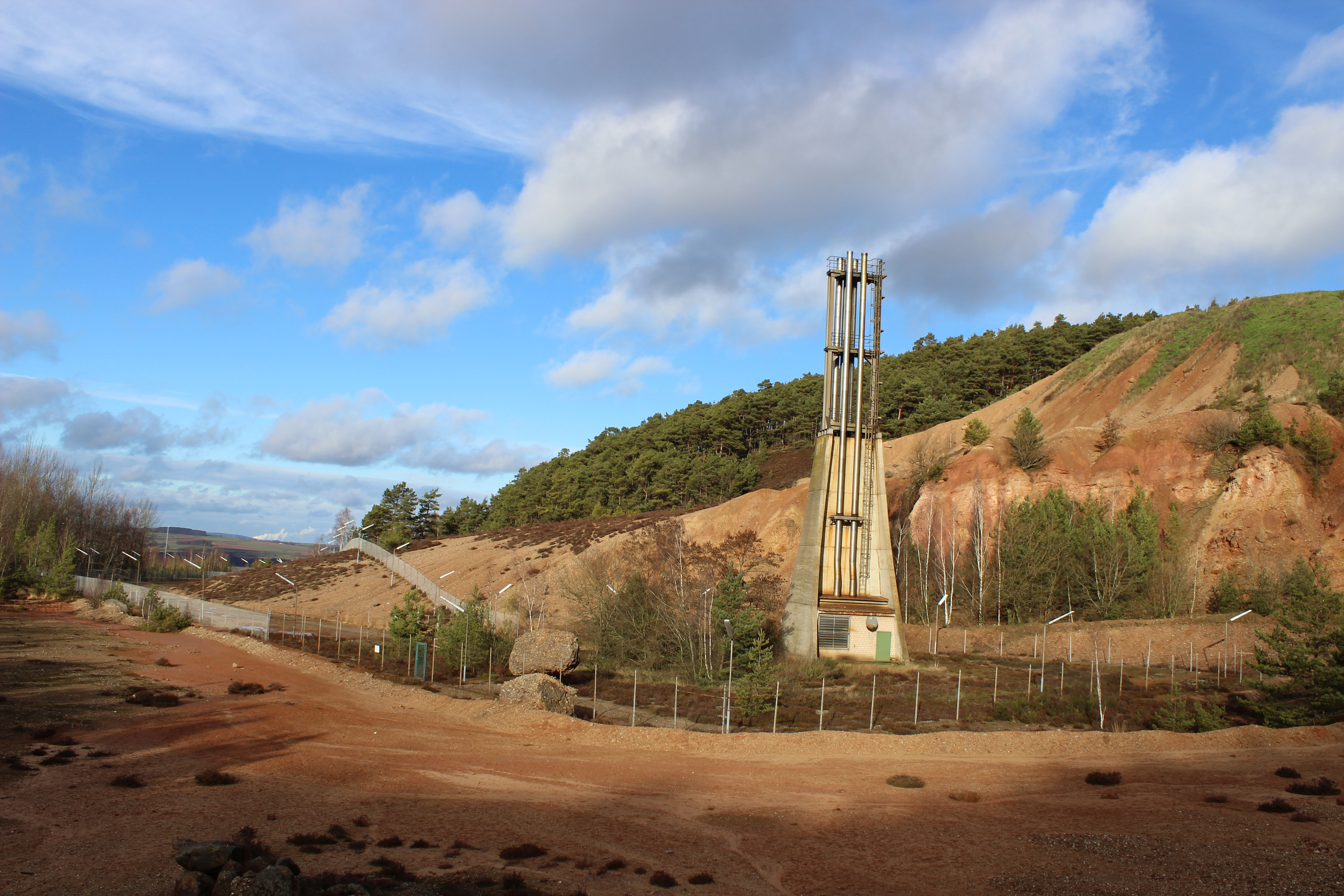 Naturschutzgebiet „Kallmuther Berg (LP Mechernich)“ (NSG EU-102) in Mechernich – Das Gebiet ist durch den ehemaligen Bleierzabbau geprägt. Heute wird das Gebiet noch teilweise von der Bundeswehr genutzt. Hier befindet sich die Untertageanlage - kurz UTA. Im wohl unauffälligsten Bundeswehr-Depot lagern über 120.000 Artikel, vornehmlich Luftwaffen-Material in 130 Meter Tiefe und einem ca. 13 Kilometer langem Stollensystem unter der Erde. Kennzeichnend für das Landschaftsbild sind vegetationsarme Sekundärstandorte wie offene Halden, Bergwerkstollen, Felsfluren und Pioniervegetation. Zu der außergewöhnlichen Artenvielfalt auf engem Raum trägt die Verzahnung dieser Strukturen mit naturnahen Laubwäldern und wertvollen Gewässern bei.